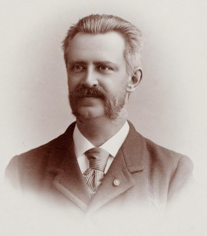 Anthonie Thomas Lubertus Mulder Rouwenhorst, geboren te Leiden, overleden te Nijmegen, civiel Ingenieur, buitengewoon opzichter bij Waterstaat, architect in Japan. Foto circa 1890 - 1901.